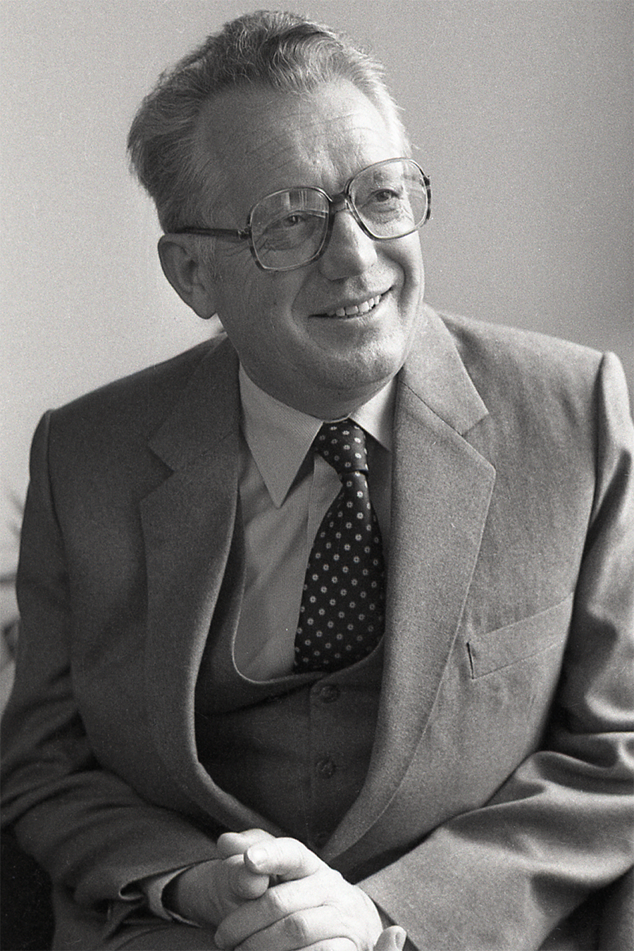 Srpski (latinica): Dušan Čkrebić je srpski političar, bivši visoki državni i partijski funkcioner Srbije u doba Socijalističke Federativne Republike Jugoslavije.